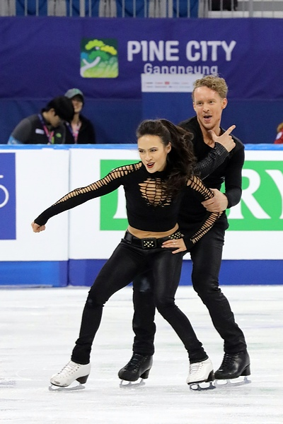 Мэдисон Чок и Эван Бейтс на чемпионате четырёх континентов 2017.